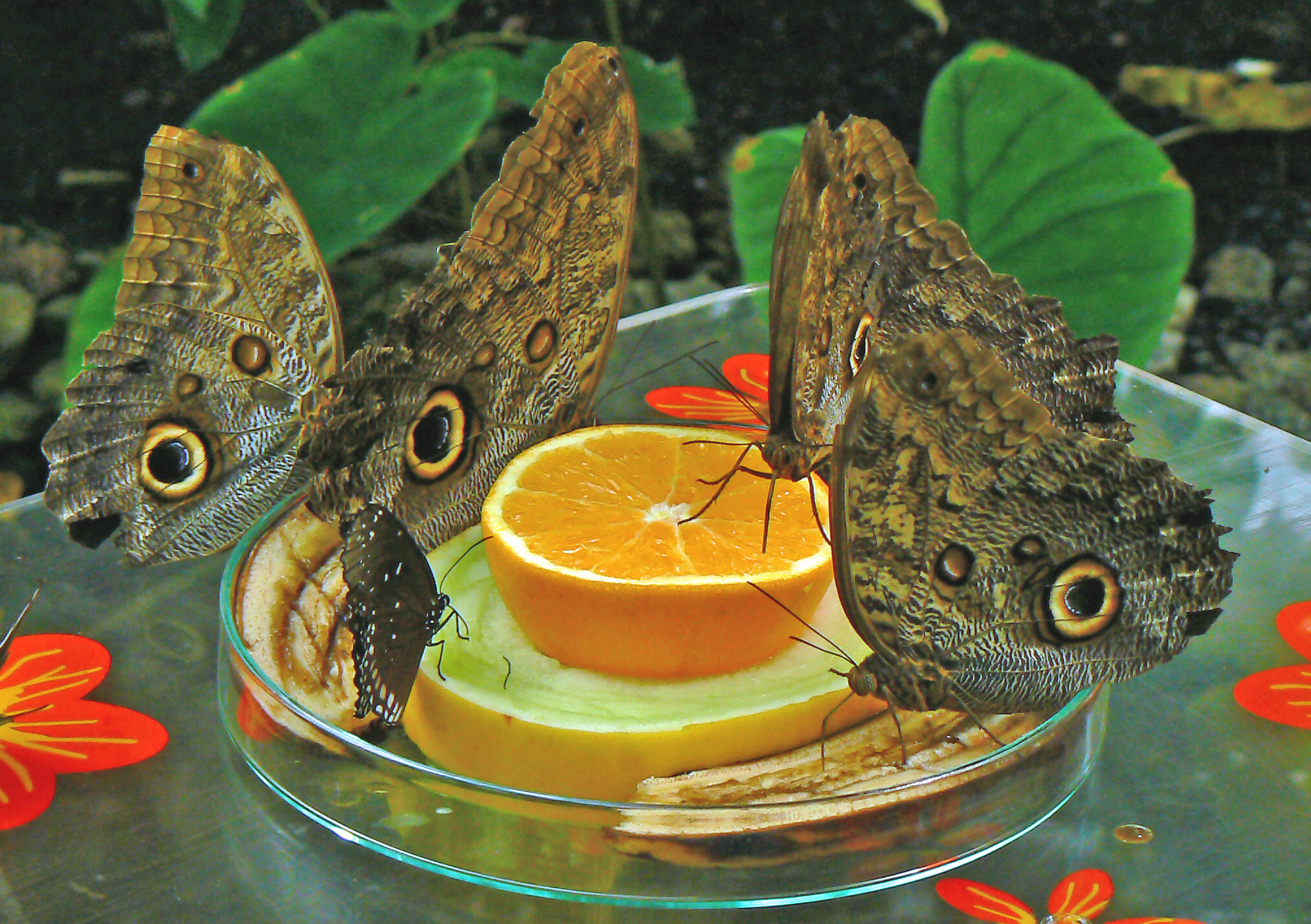 Schmetterlingshaus Mannheim